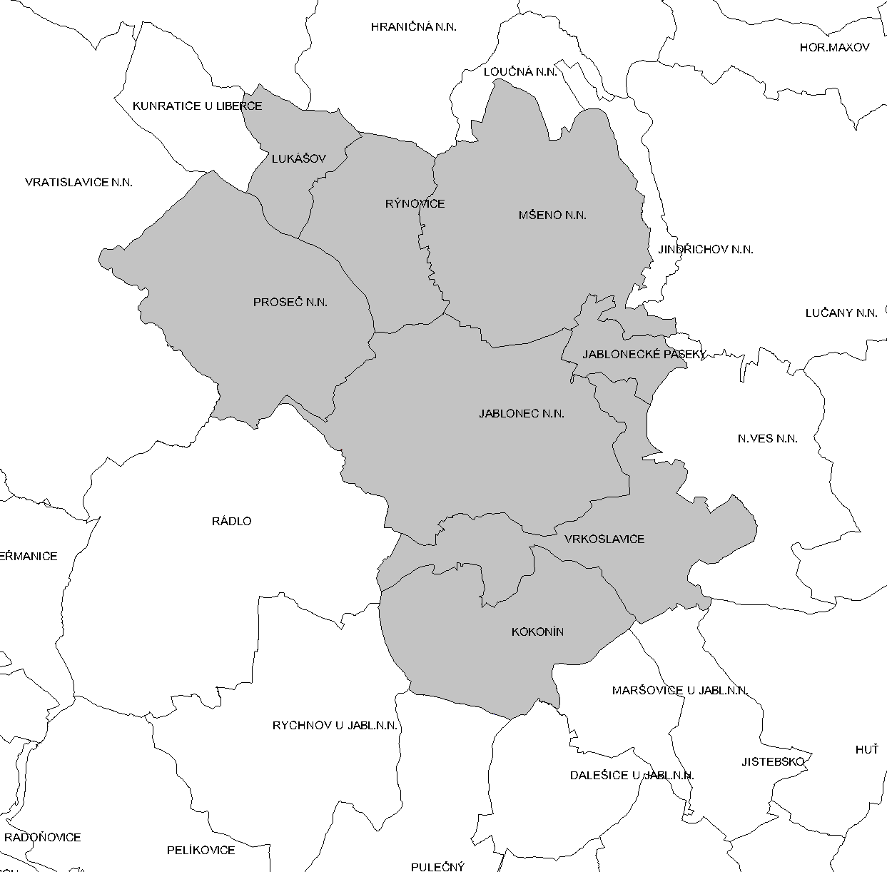 Katastrální členění Jablonce nad Nisou. Členění na místní části se lehce liší, místní část Jablonecké Paseky zahrnuje ve své severní části i část katastrálního území Mšeno nad Nisou a odděluje tak z místní části Mšeno nad Nisou na východě města exklávu.